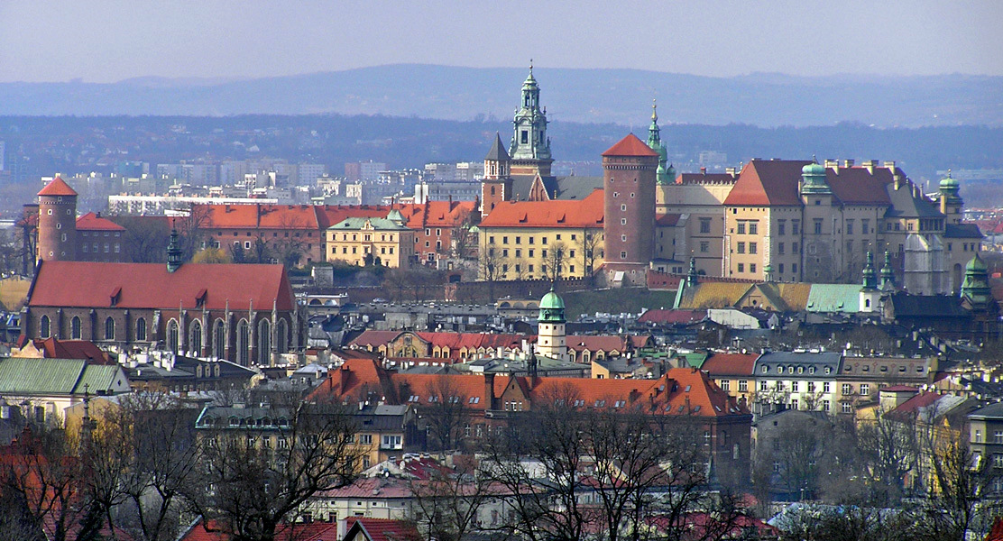 Kraków - Wawel, Kościół św. Katarzyny, Kościół Bernardynów, Ratusz Kazimierski, Szpital Bonifratrów - view from Kopiec Krakusa